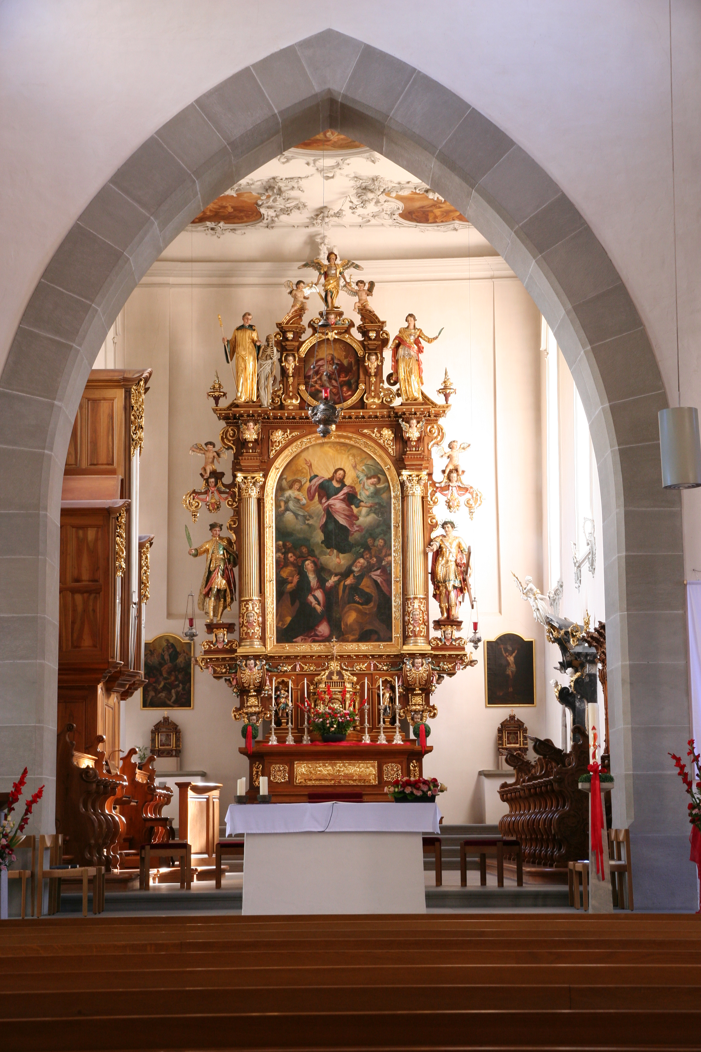 röm.-kath. Pfarrkirche St. Pelagius in Bischofszell